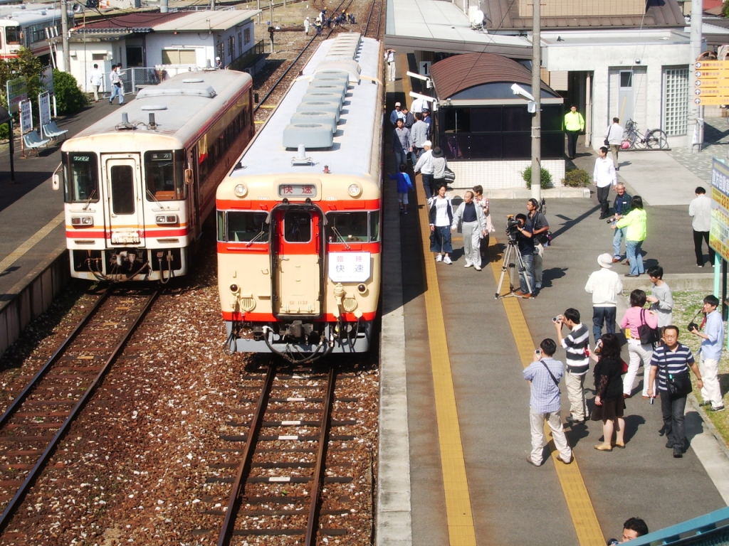 金田駅構内